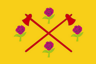 Bandeira de Guarantã - SP - Brasil.